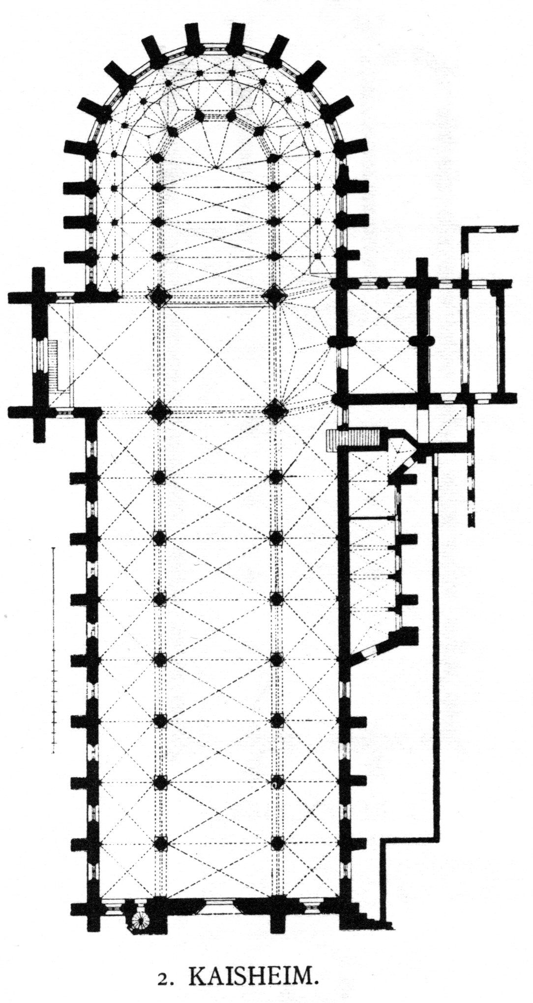 Kaisheim, Zisterzienserkirche